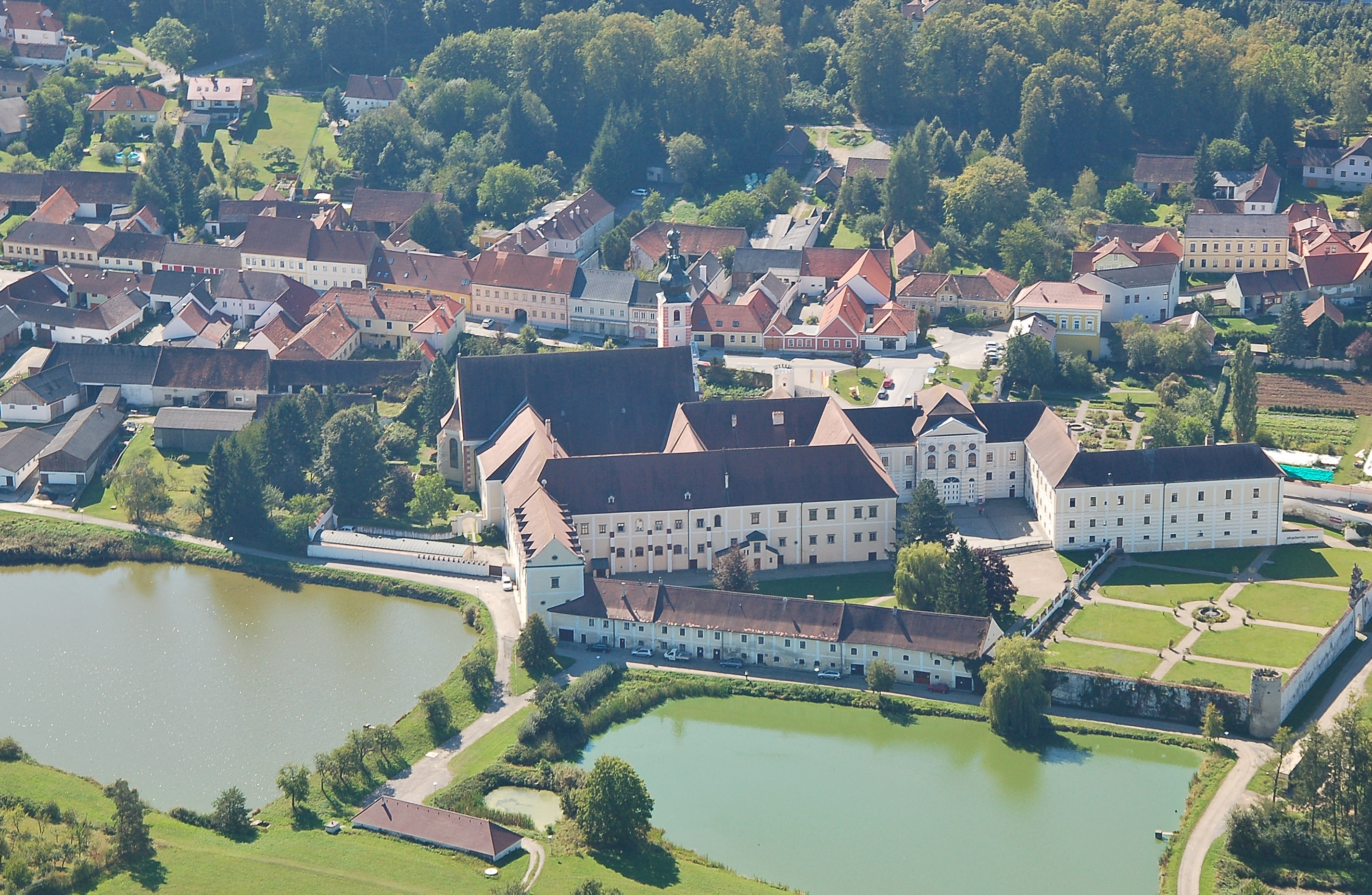 Gesamtanlage Stift Geras